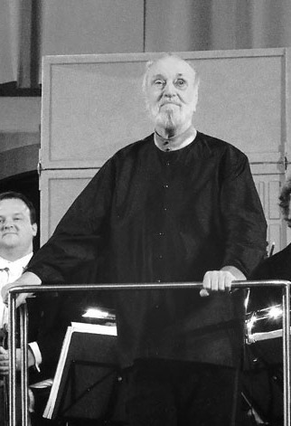 Kurt Masur am Pult der Dresdner Philharmonie am 6. Dezember 2012 im Dresdner Albertinum